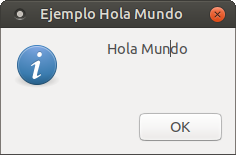 Ejemplo de hola mundo hecho en bash con zenity en un GNU/Linux. El código es: #! /bin/bash zenity --info --title="Ejemplo Hola Mundo" --text="Hola Mundo" --width=150